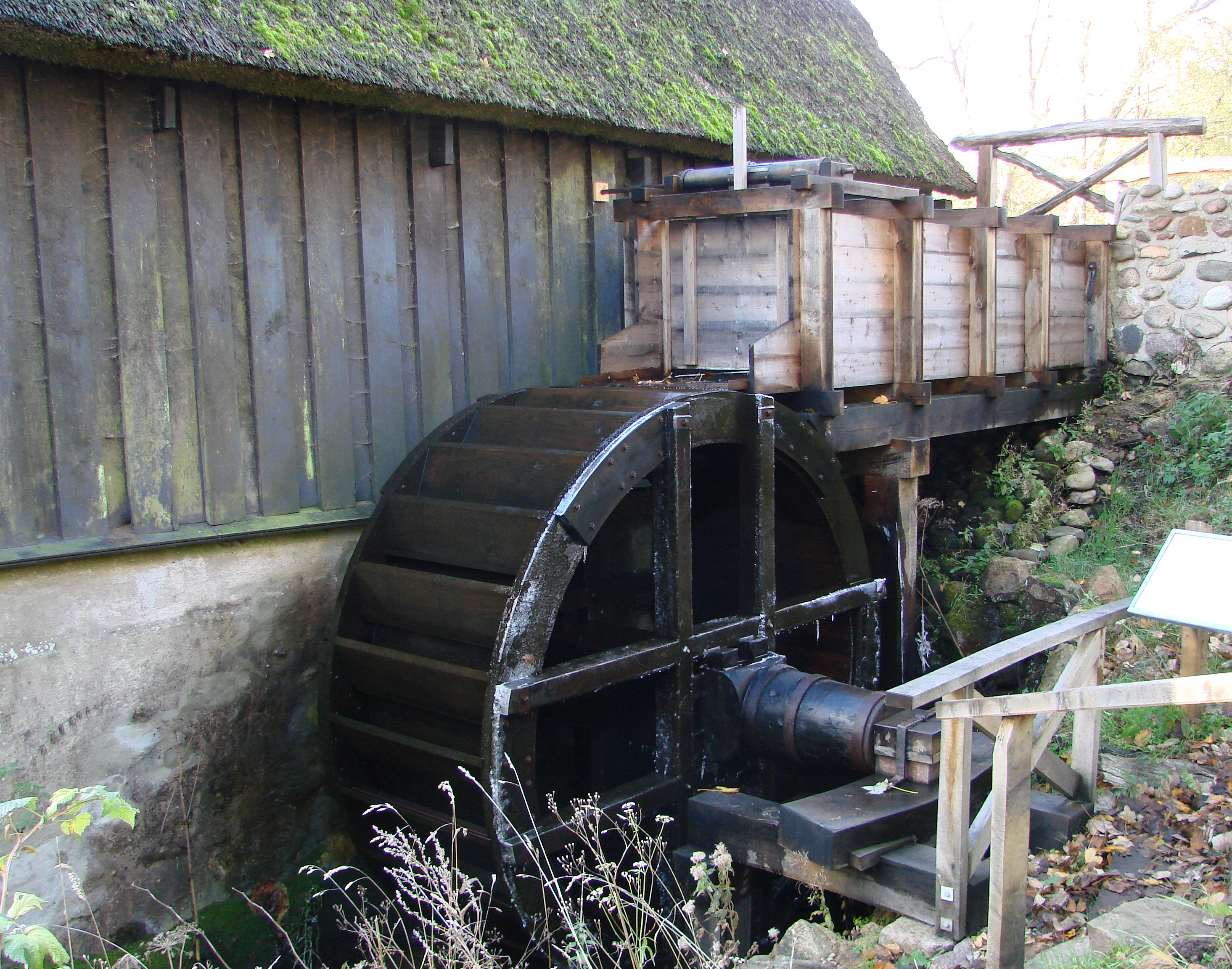 Ørnbjerg Mølle - møllehjulet set fra nordvest